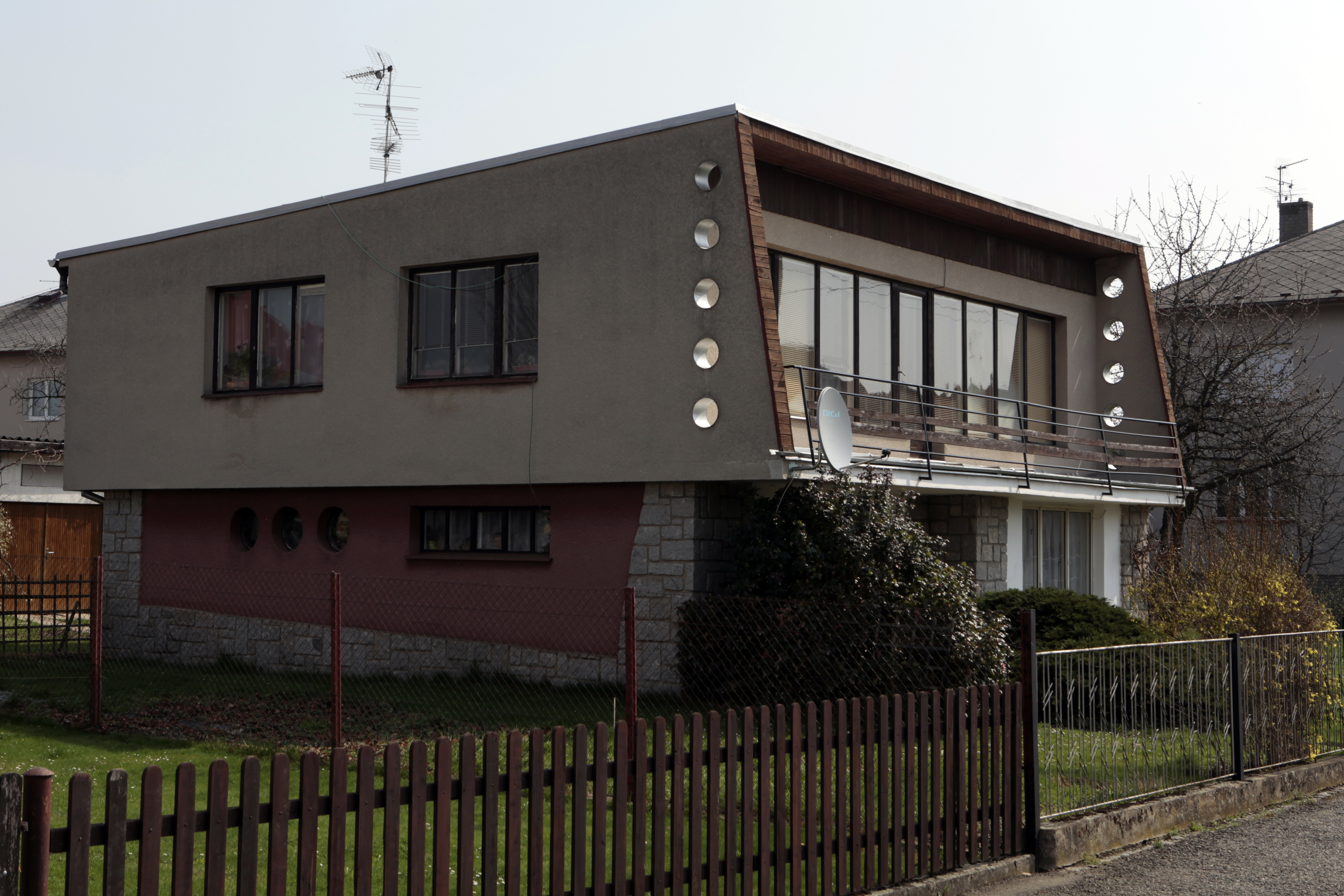 Šumperák, rodinný dům typu V, foto: Vít Švajcr Dobré světlo.com.